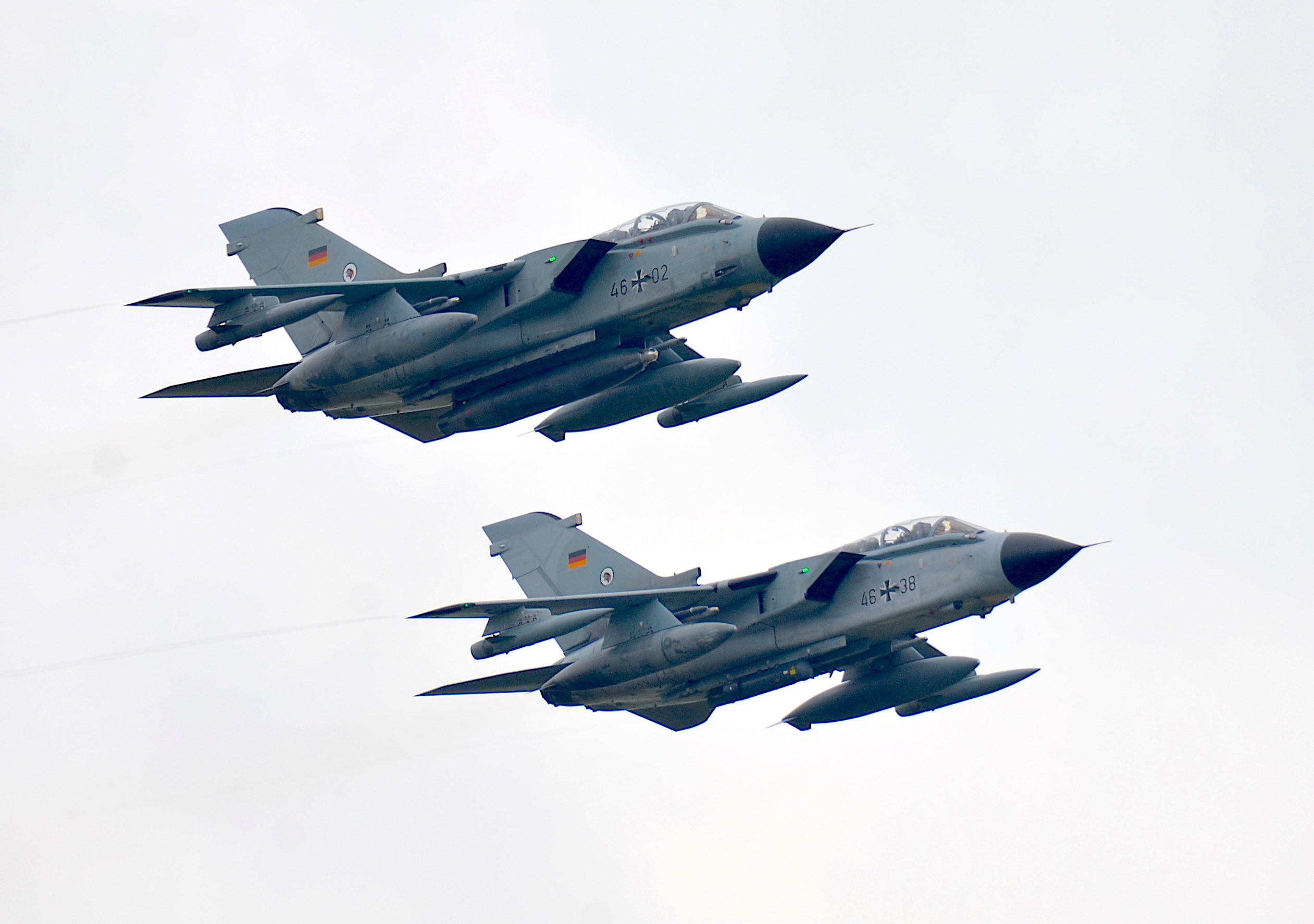 Panavia Tornado IDS and ECR der Deutschen Luftwaffe